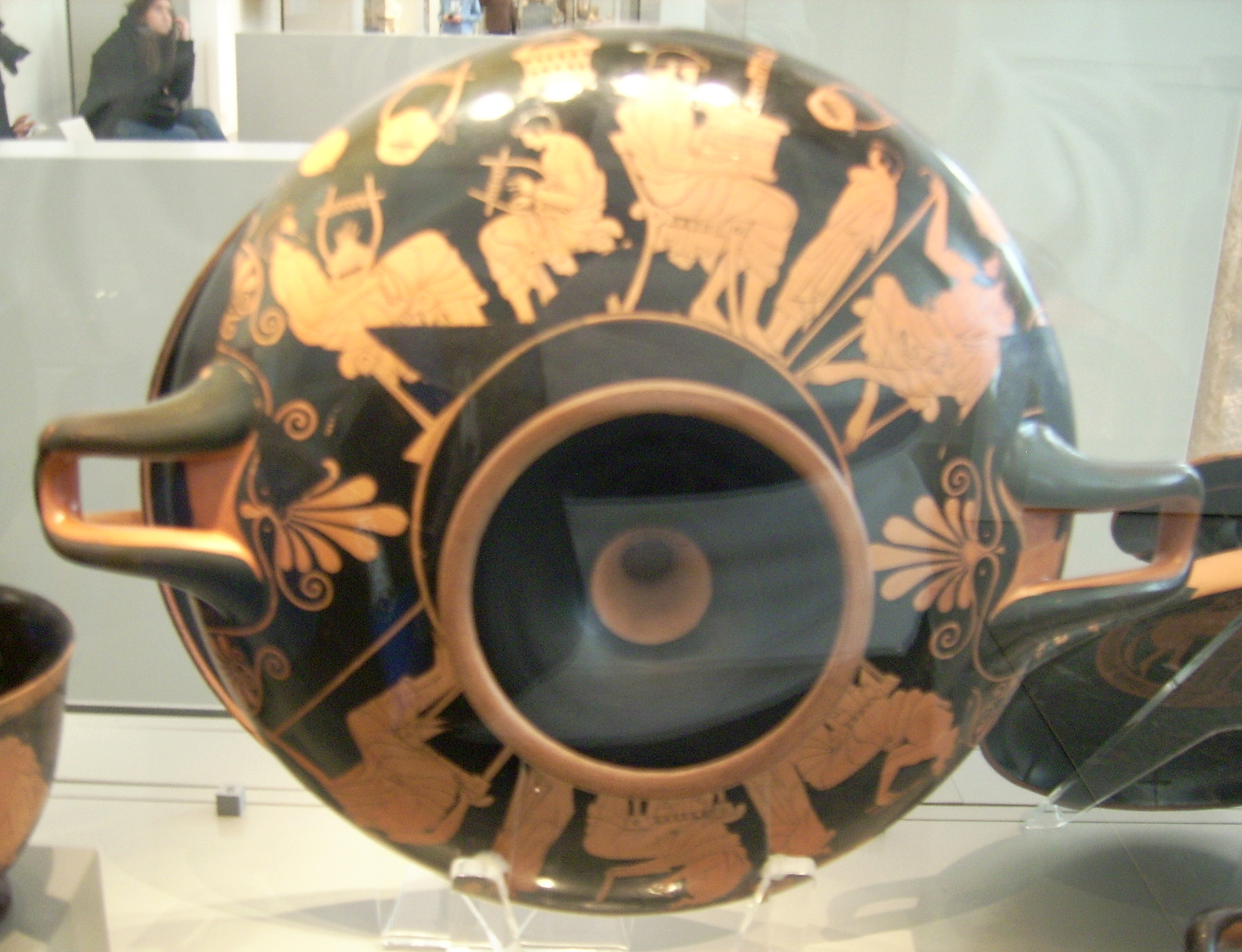 Schulszenen auf einer attisch-rotfigurigen Trinkschale (Kylix) des Douris, um 480 v. Chr., gefunden in Cerveteri, Durchmesser 28,5 cm, Inventarnummer F 2285, Antikensammlung Berlin/Altes Museum